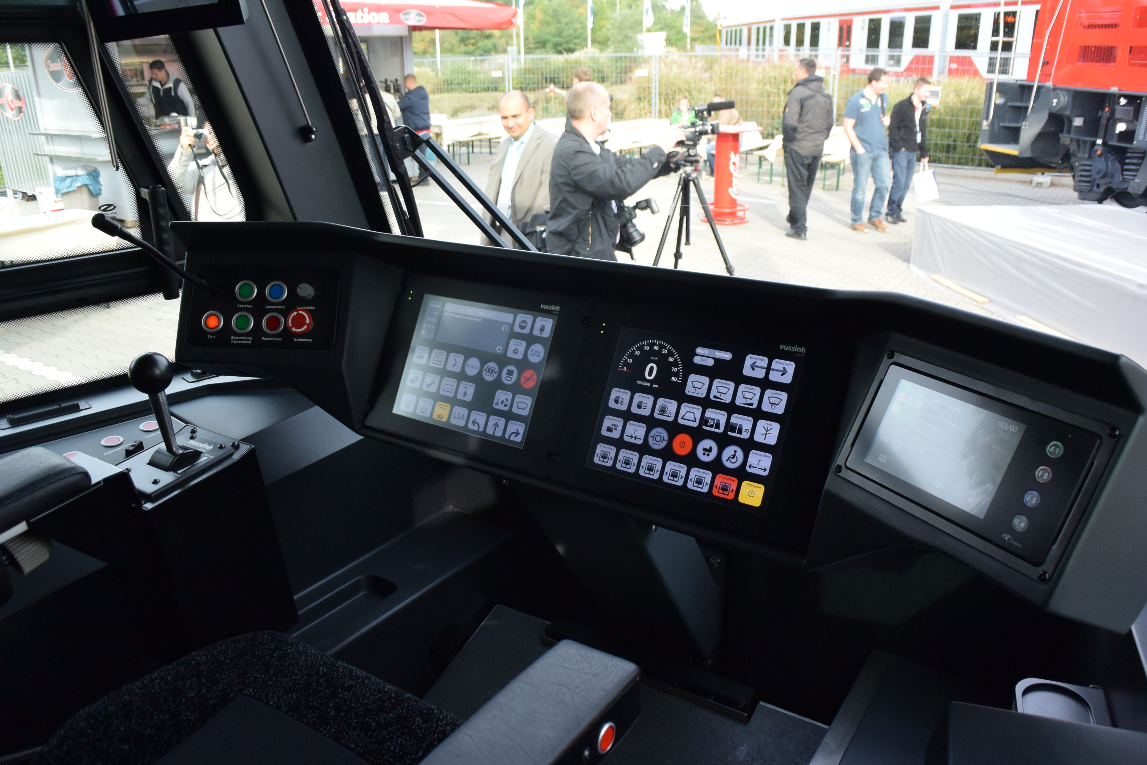 Solaris Tramino Braunschweig podczas InnoTrans 2014